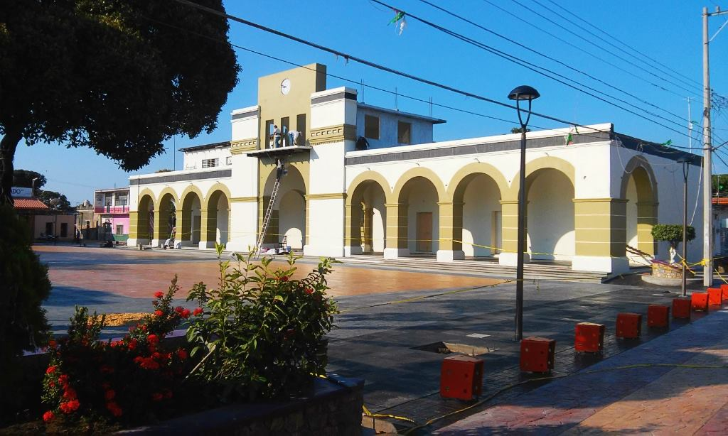 Palacio Municipal de Asunción Ixtaltepec